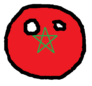 Polandball de Marruecos